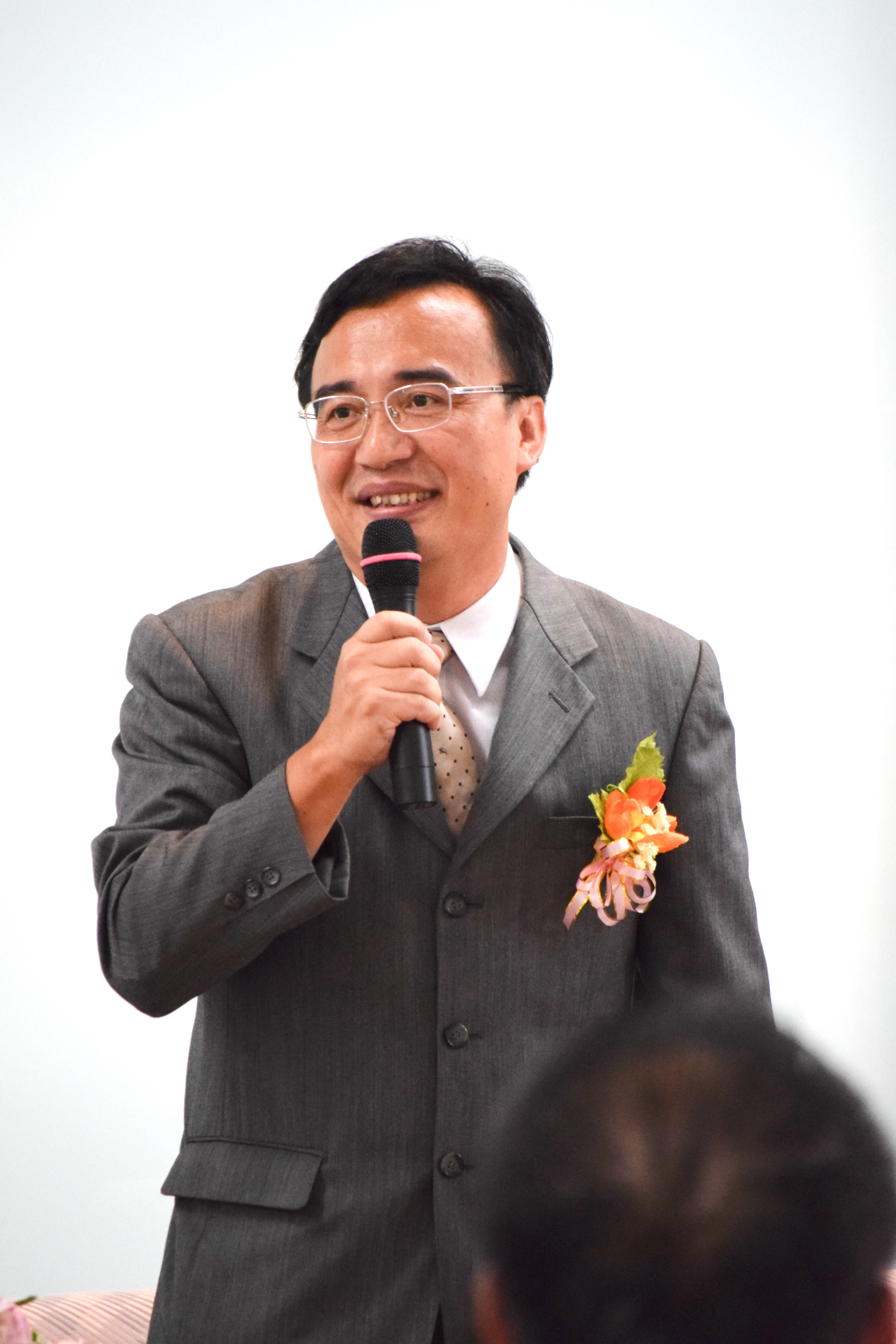 麗山校長柯明樹，攝於麗山高中校長就職典禮